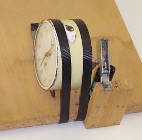 Zeitzünder für einen Brandsatz, krimineller Hintergrund